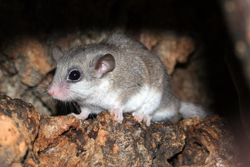 Graphiurus spec, probably G.murinus (compare: "G.murinus" ISBN 3-8290-3610-8 p.165)